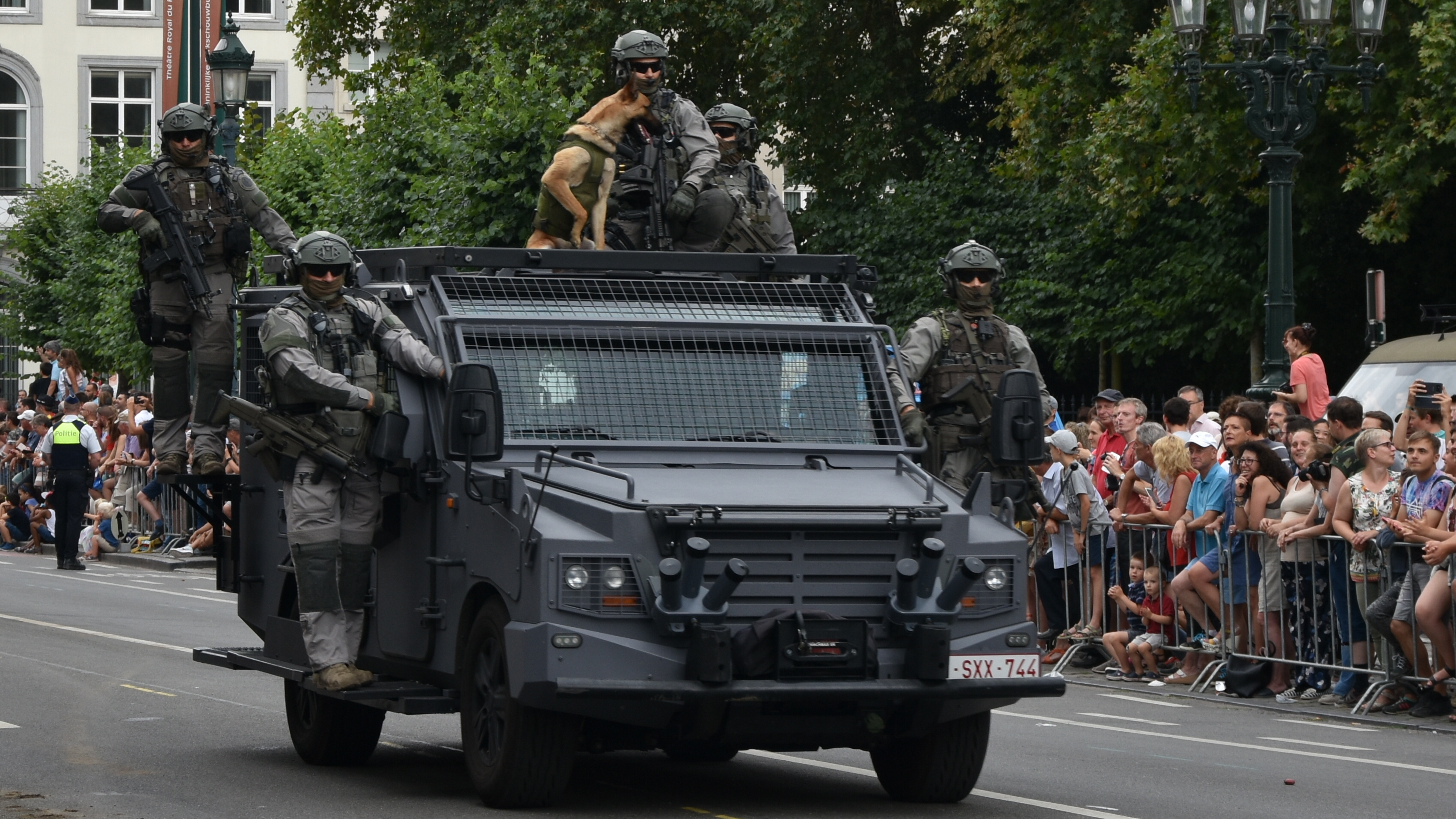 Ares pantservoertuig van de Directie speciale eenheden - Nationaal defilé 2018 This photo of immaterial heritage has been taken in the Brussels Capital Region